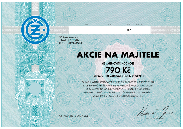 Ukázka listinné akcie